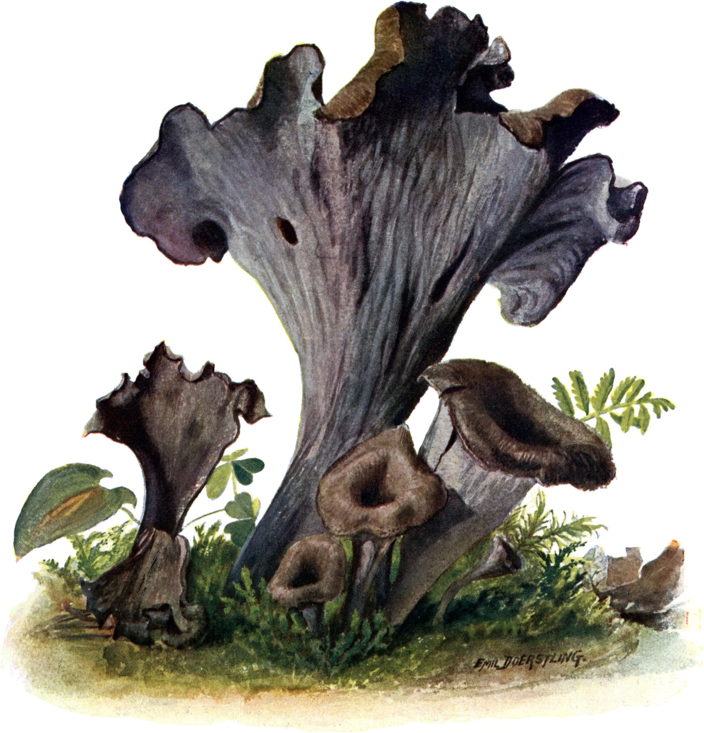 Totentrompete, Craterellus cornucopioides. Eßbar.